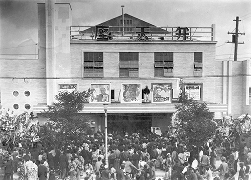 名古屋 弁天映画劇場（1938年）